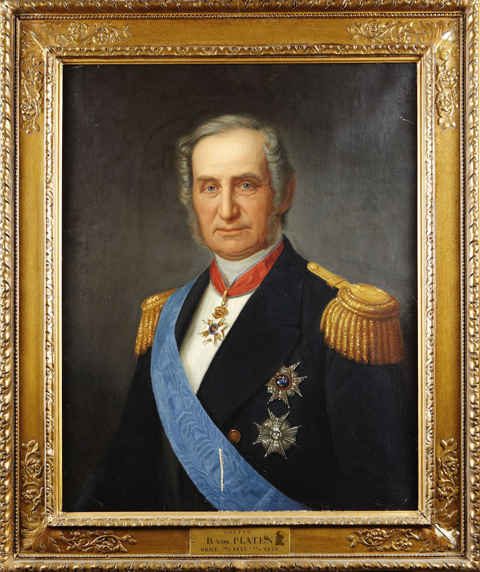 Greve Baltzar von Platen (1804-1875)